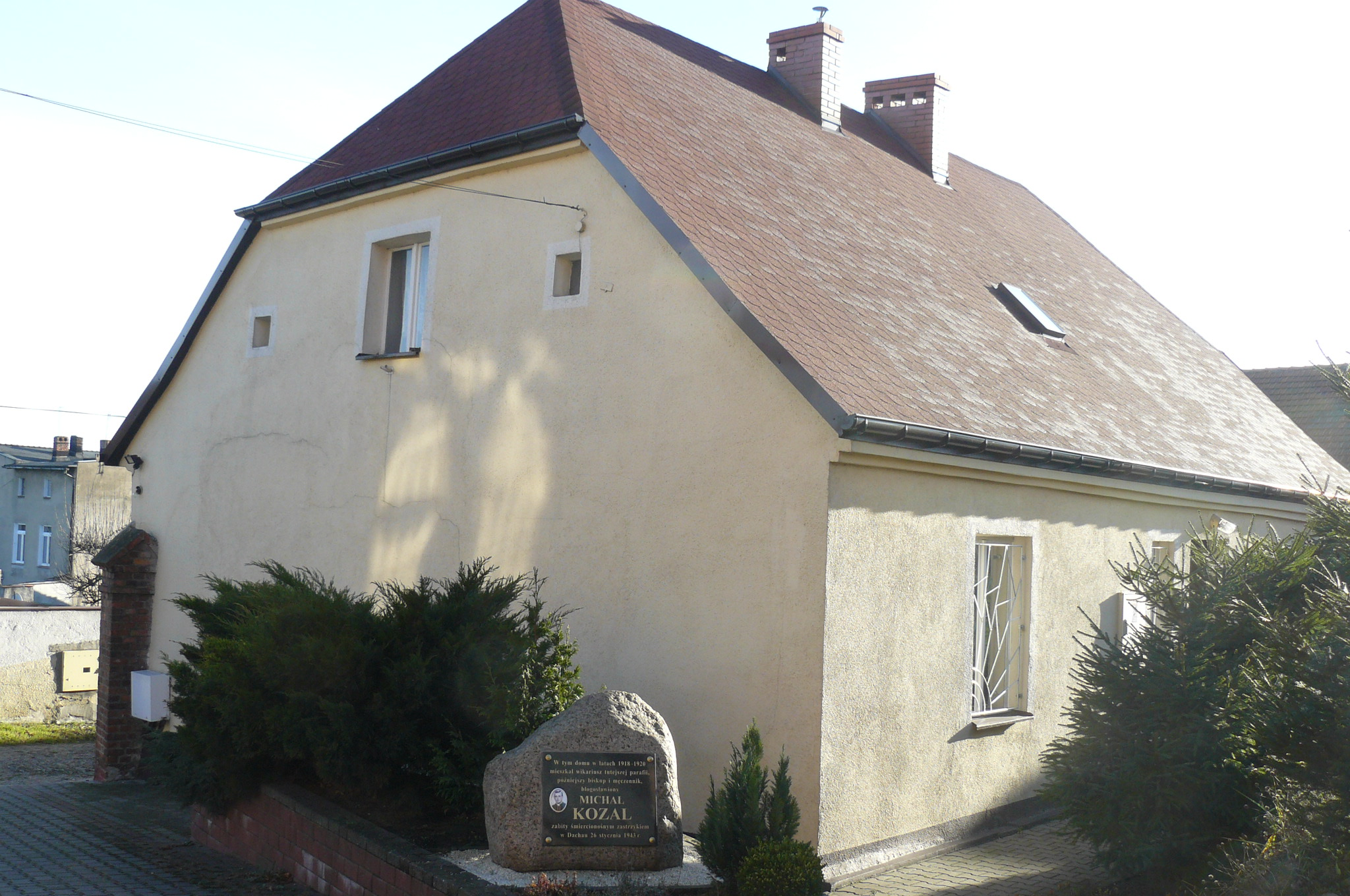 Dom Michała Kozala w Pobiedziskach.